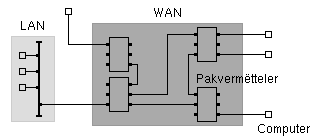 Schemateschen Opbau vun engem WAN (November 2005).